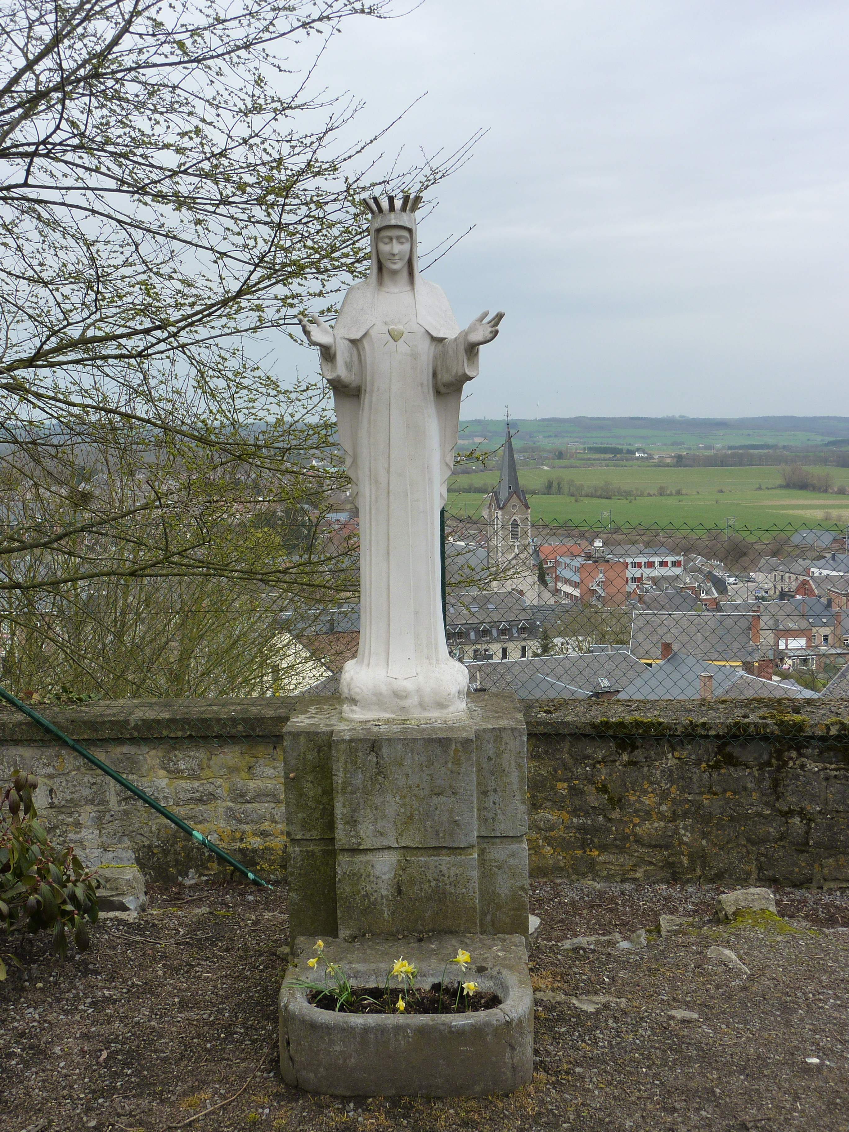 Notre Dame de Beauraing